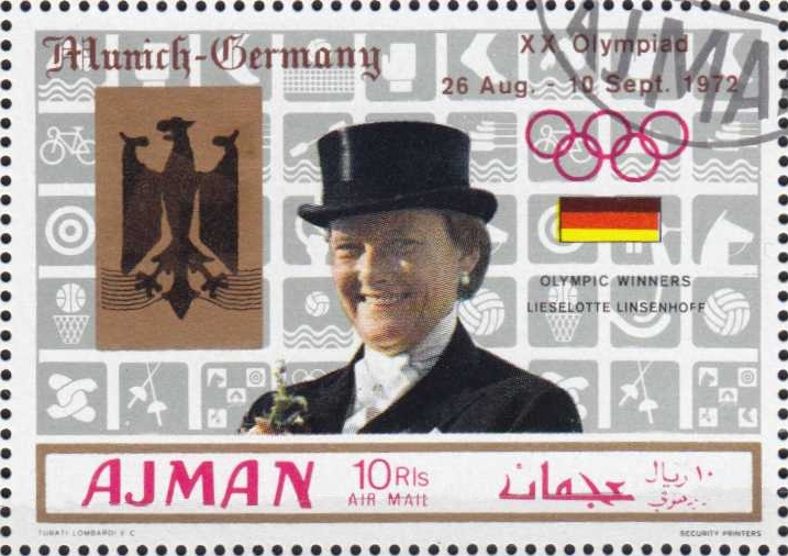 Liselott Linsenhoff